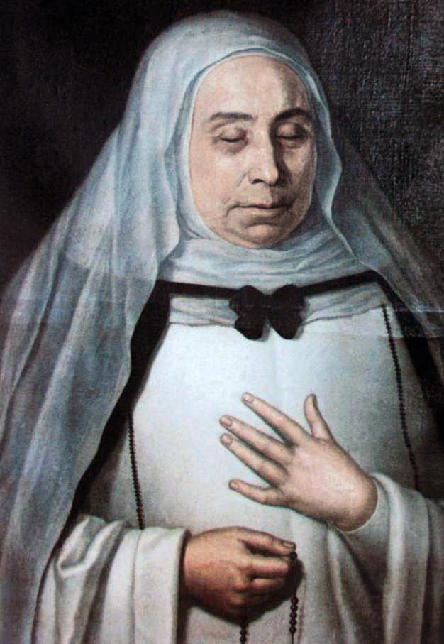 Retrato funerario de La Siervita de Dios, María de León Bello y Delgado.